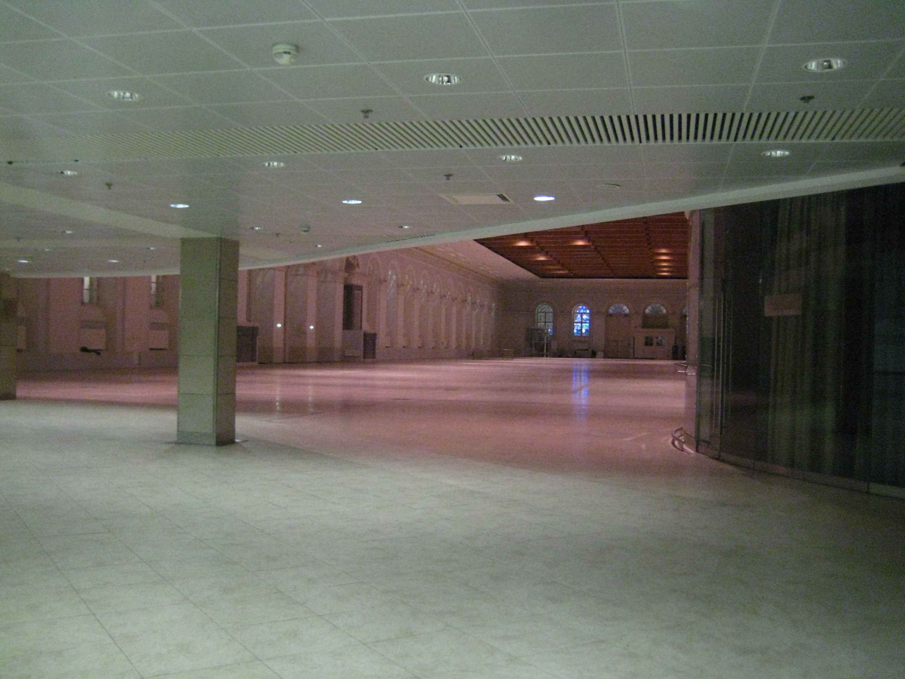 Московский Манеж. Интерьер